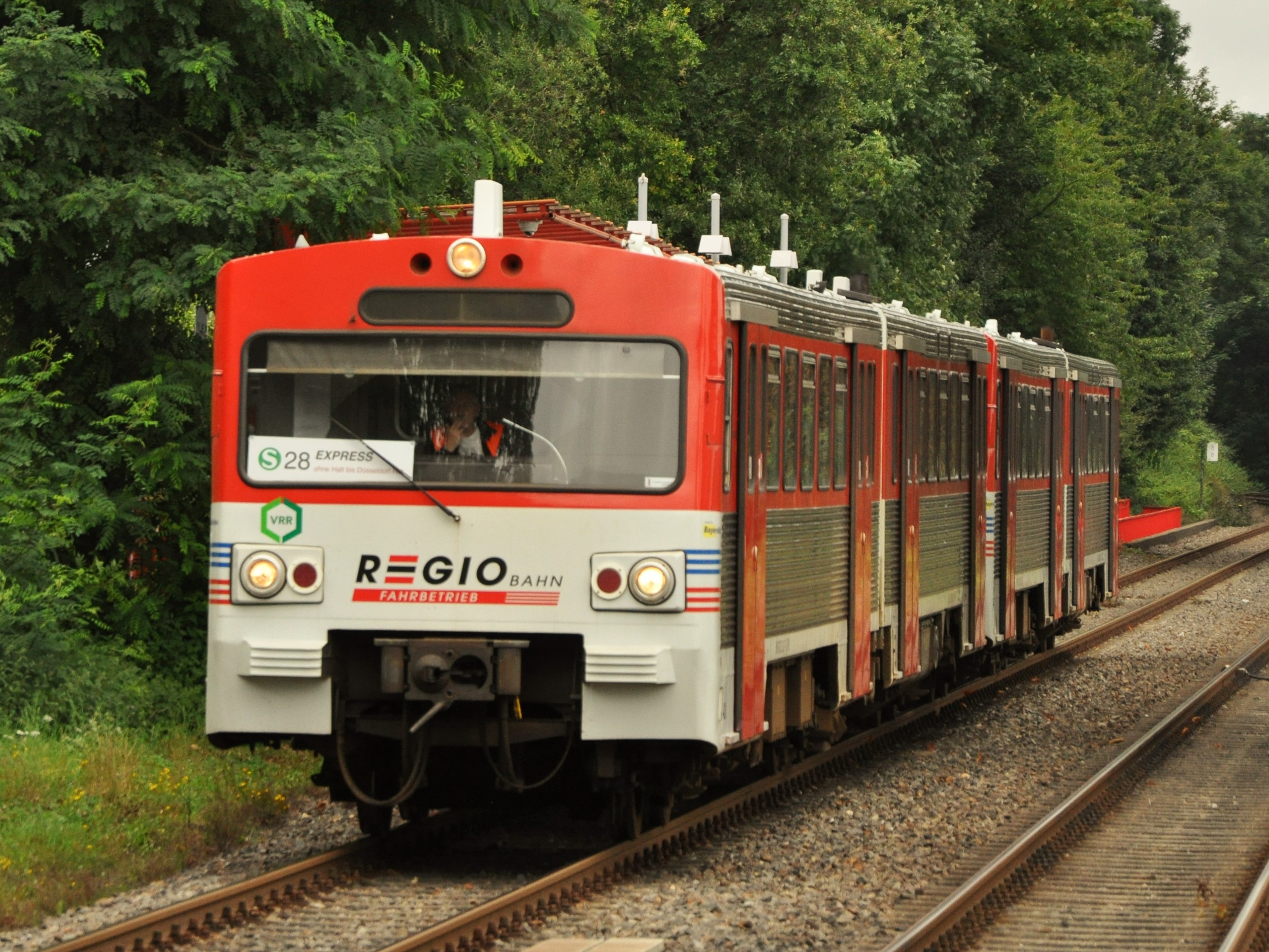 VT2E der Bayernbahn (ex. AKN) im Dienst der Regiobahn in Erkrath-Nord